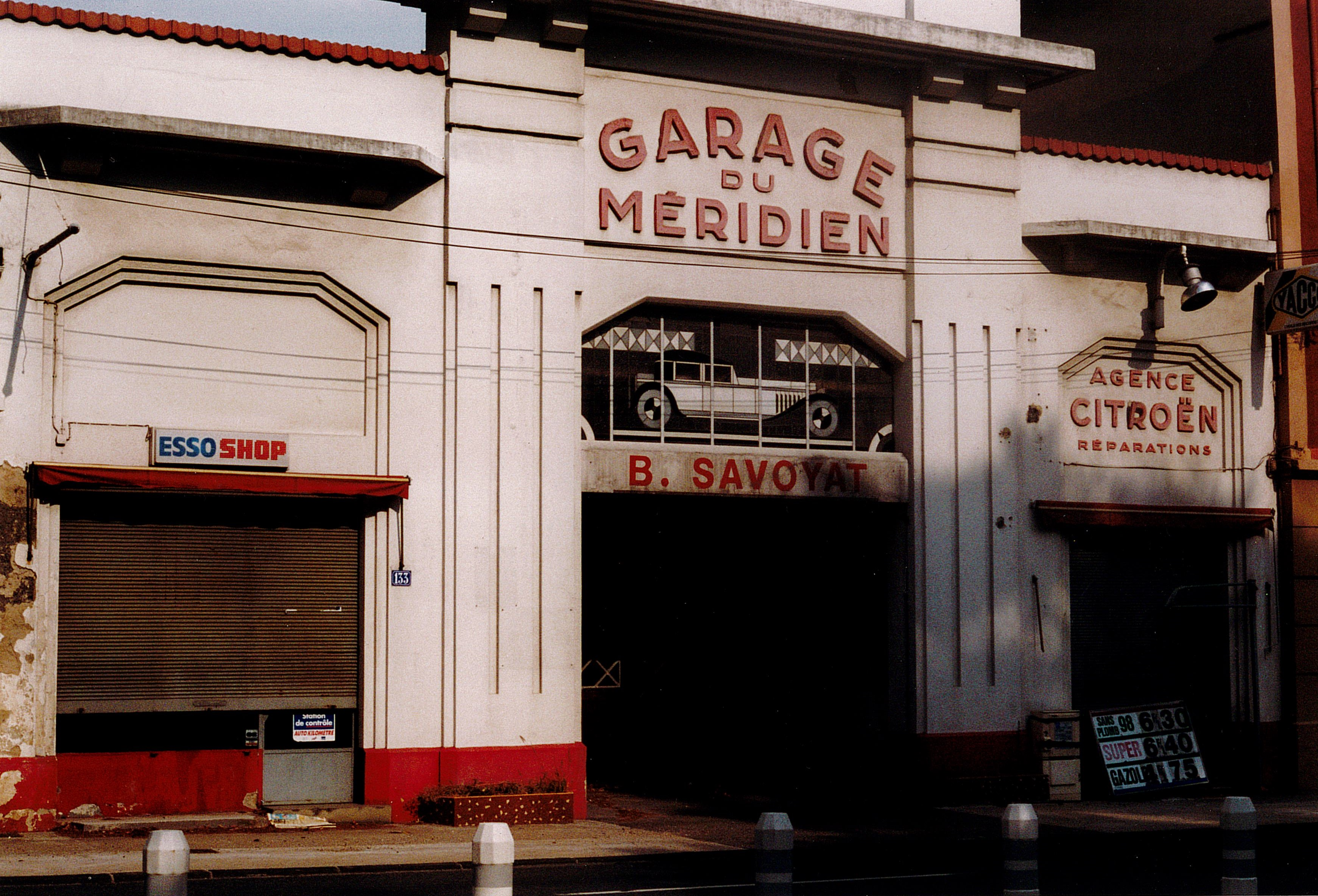 Façade de l'ancien garage automobile du Méridien B. Savoyat à Charbonnières-les-Bains, 133 route de Paris.